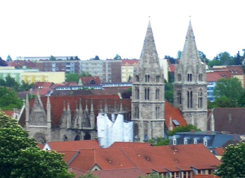 St. Blasiikirche in Mühlhausen/Thüringen vom Rabenturm aus gesehen.